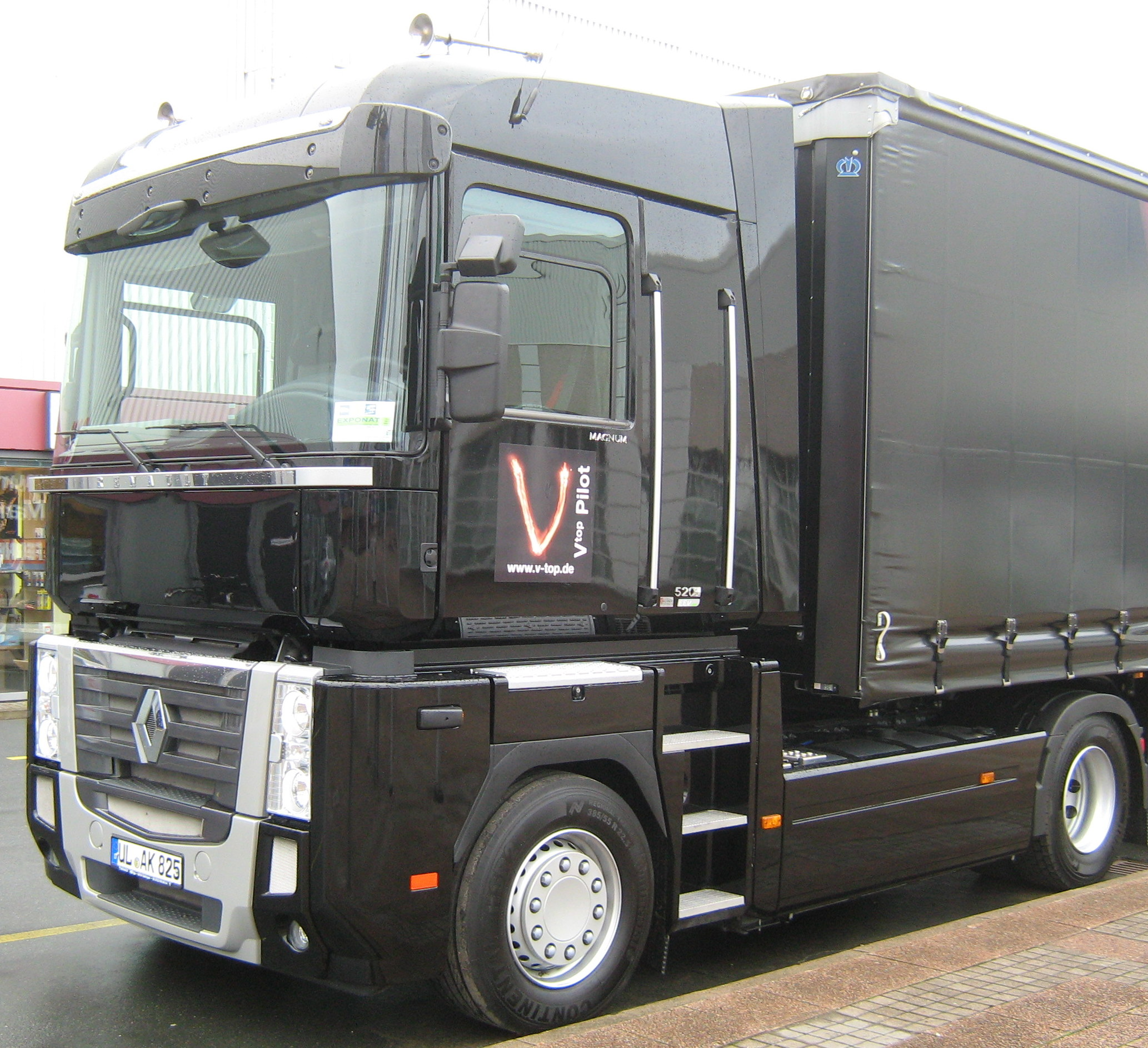 Renault LKW, Typ: Magnum vom Jahr 2010